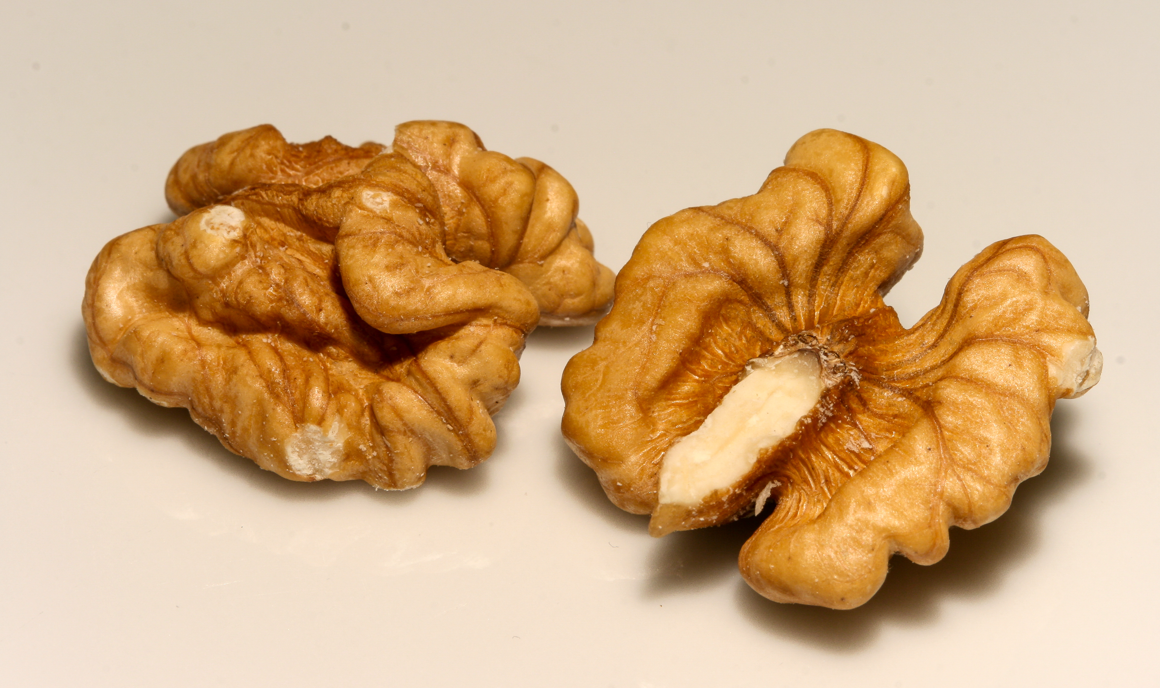 Walnuss